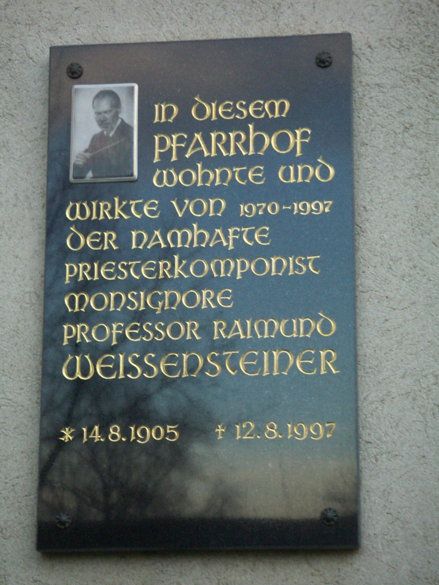 Gedenktafel zu Raimund Weissensteiner am Pfarrhof der Pfarrkirche Groß-Jedlersdorf, 1210 Wien, Amtsstraße 21-25